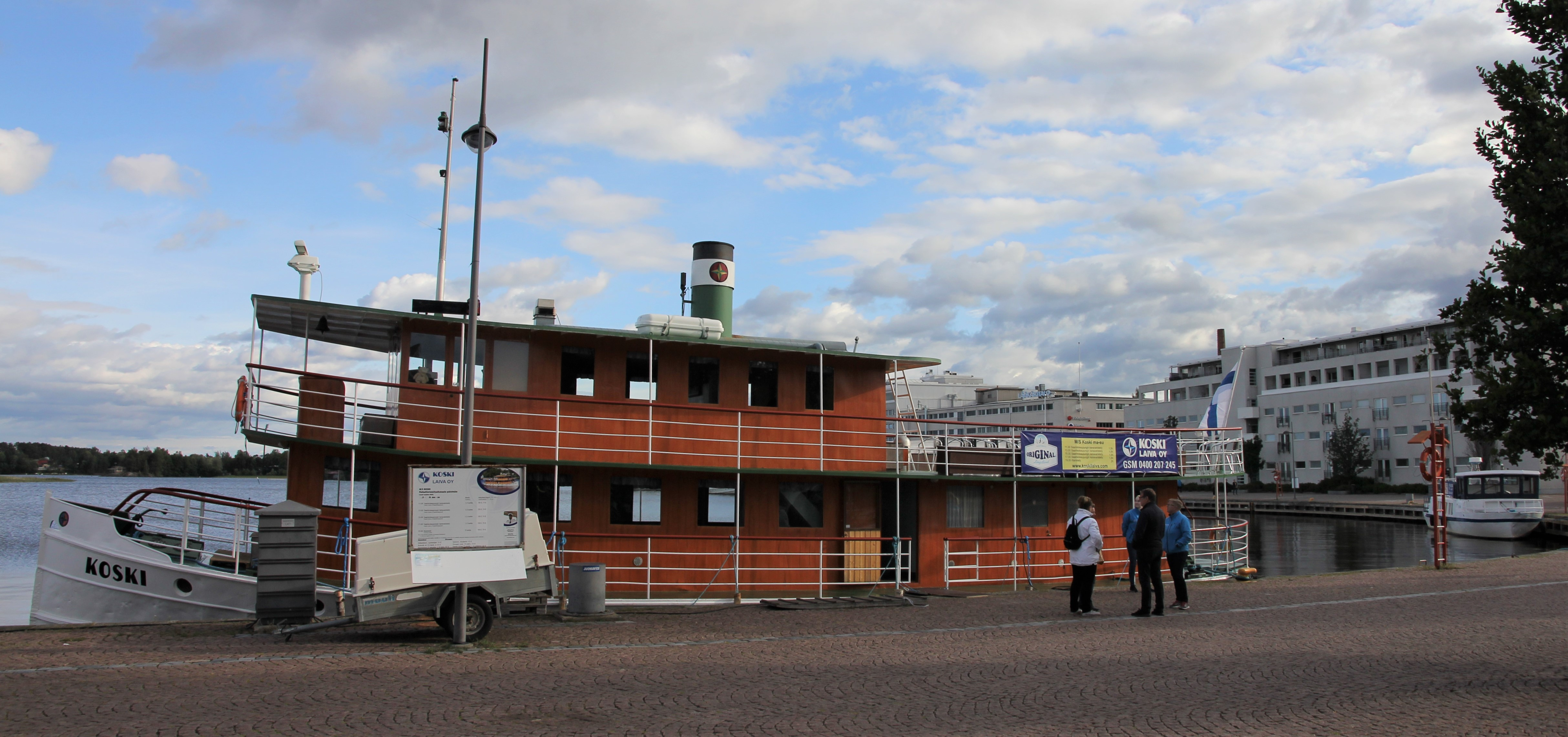 Kuopion satama-aluetta. Kuvassa risteilyalus m/s Koski (alkujaan rak. 1898 Varkaudessa, uudelleenrakennettu 1990-1997) Kuopion matkustajasatamassa. Lisätietoja aluksesta: Kuvattu 12.7.2019.